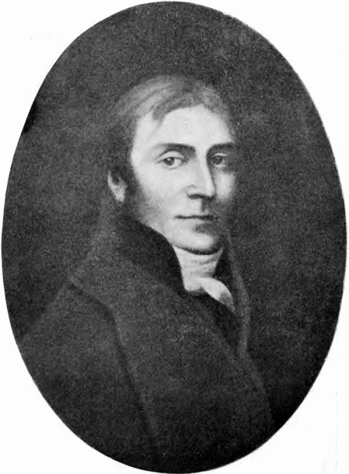 Antoni Magier (1762-1837)